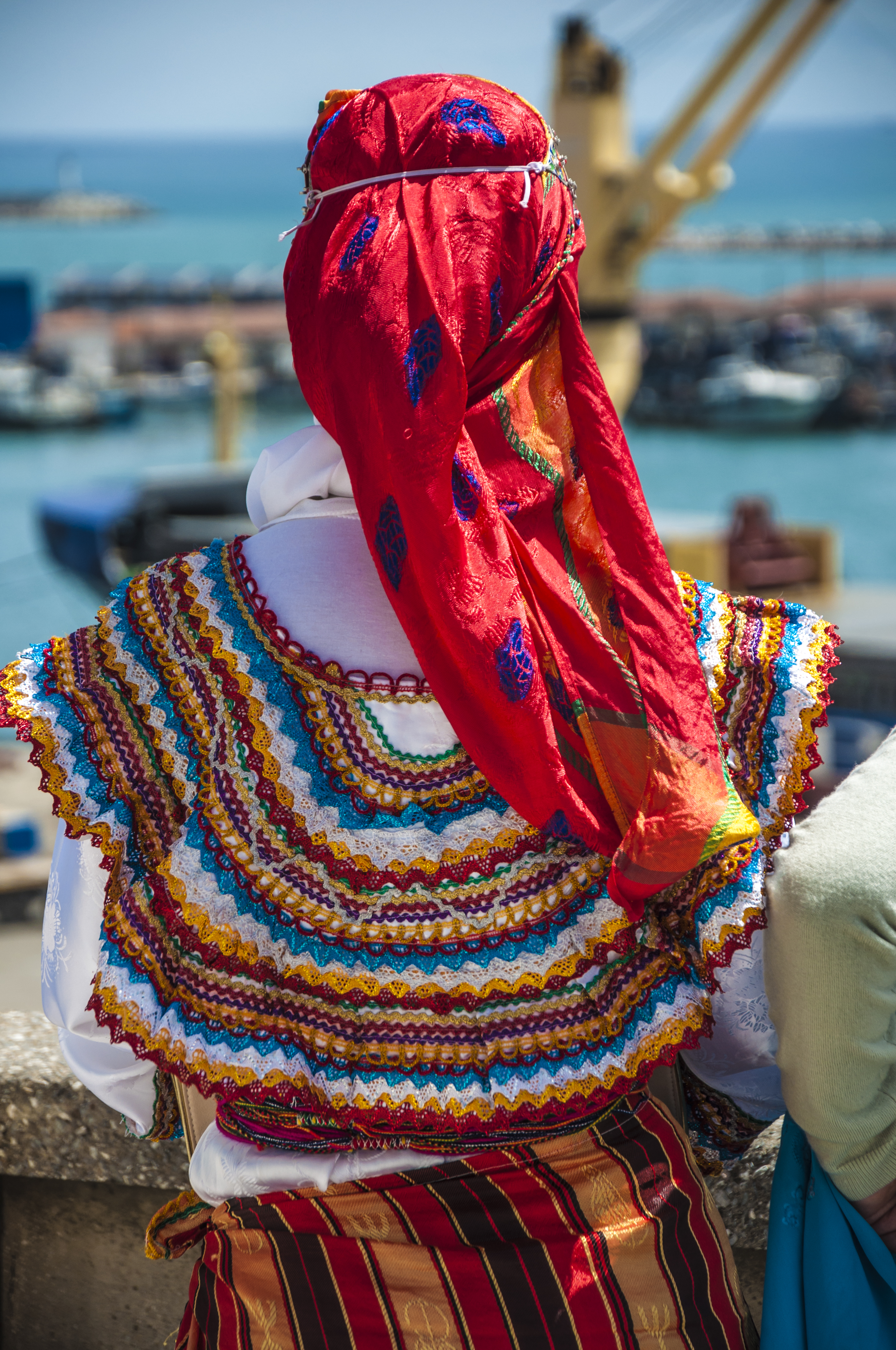 tradition kabyle bejaia algerie This is an image with the theme "Play" from: Algeria